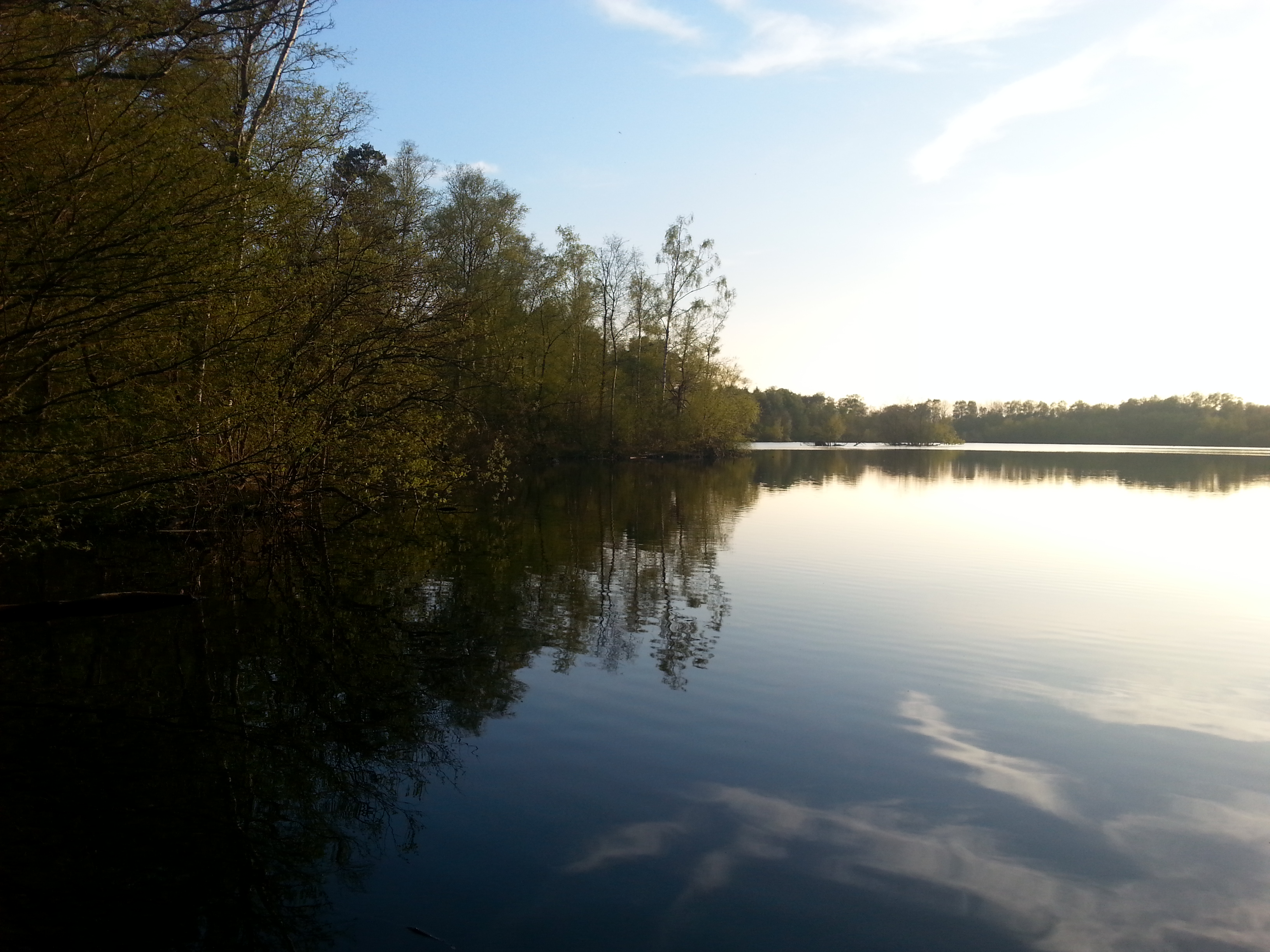 Einfach nur wunderschön: Waldhusener Moorsee in Lübeck, gelegen im FFH-Gebiet DE-2030-351 „Waldhusener Moore und Moorsee“